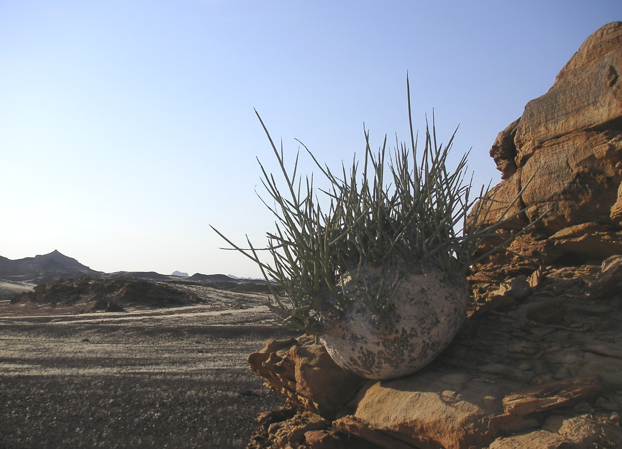 Wüstenkohlrabi oder Elefantenfuß (Adenia pechuelii). Endemische Pflanze in Namibia.